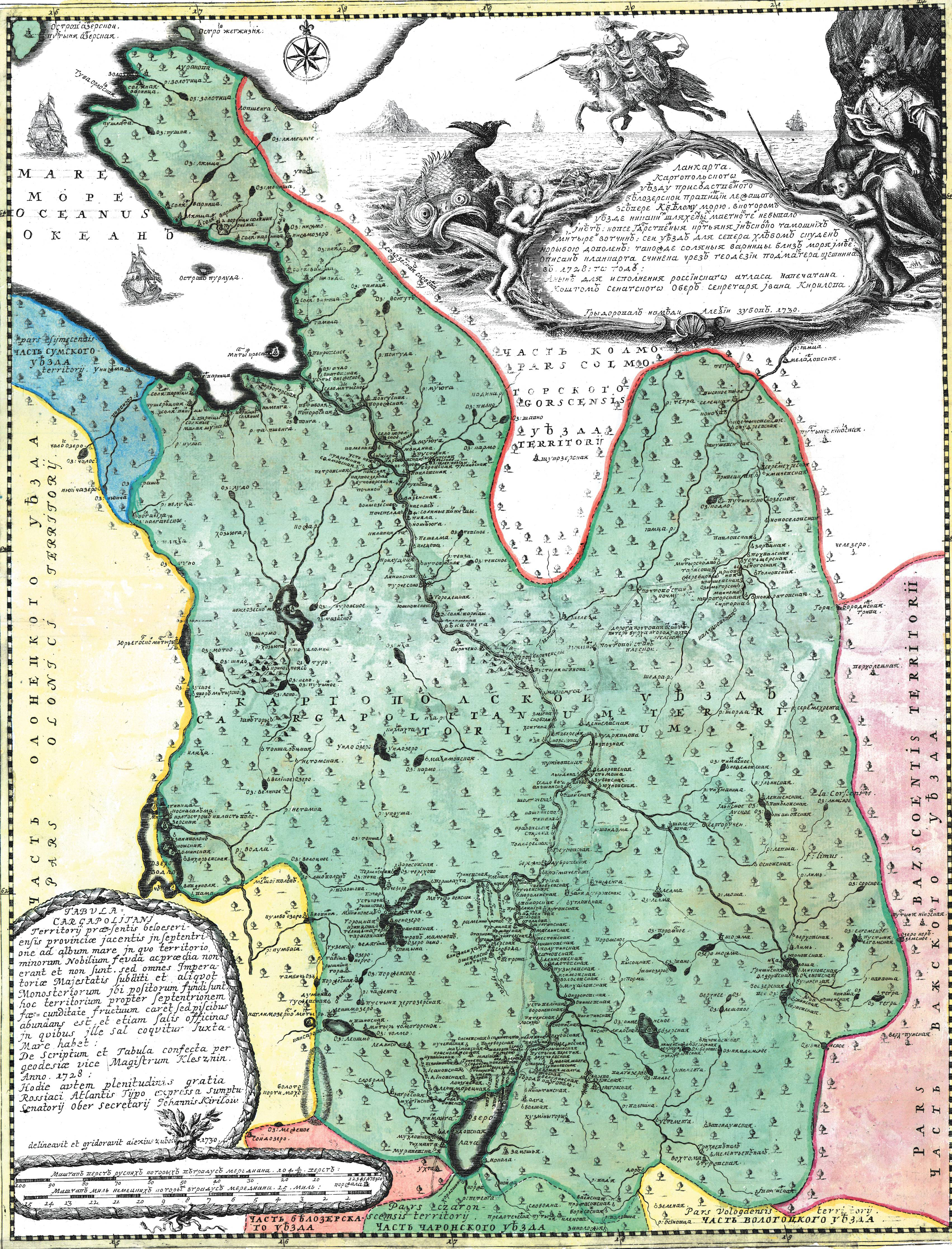 Каргопольский уезд из «Атласа Всероссийской империи» И. К. Кириллова. 1722-1737